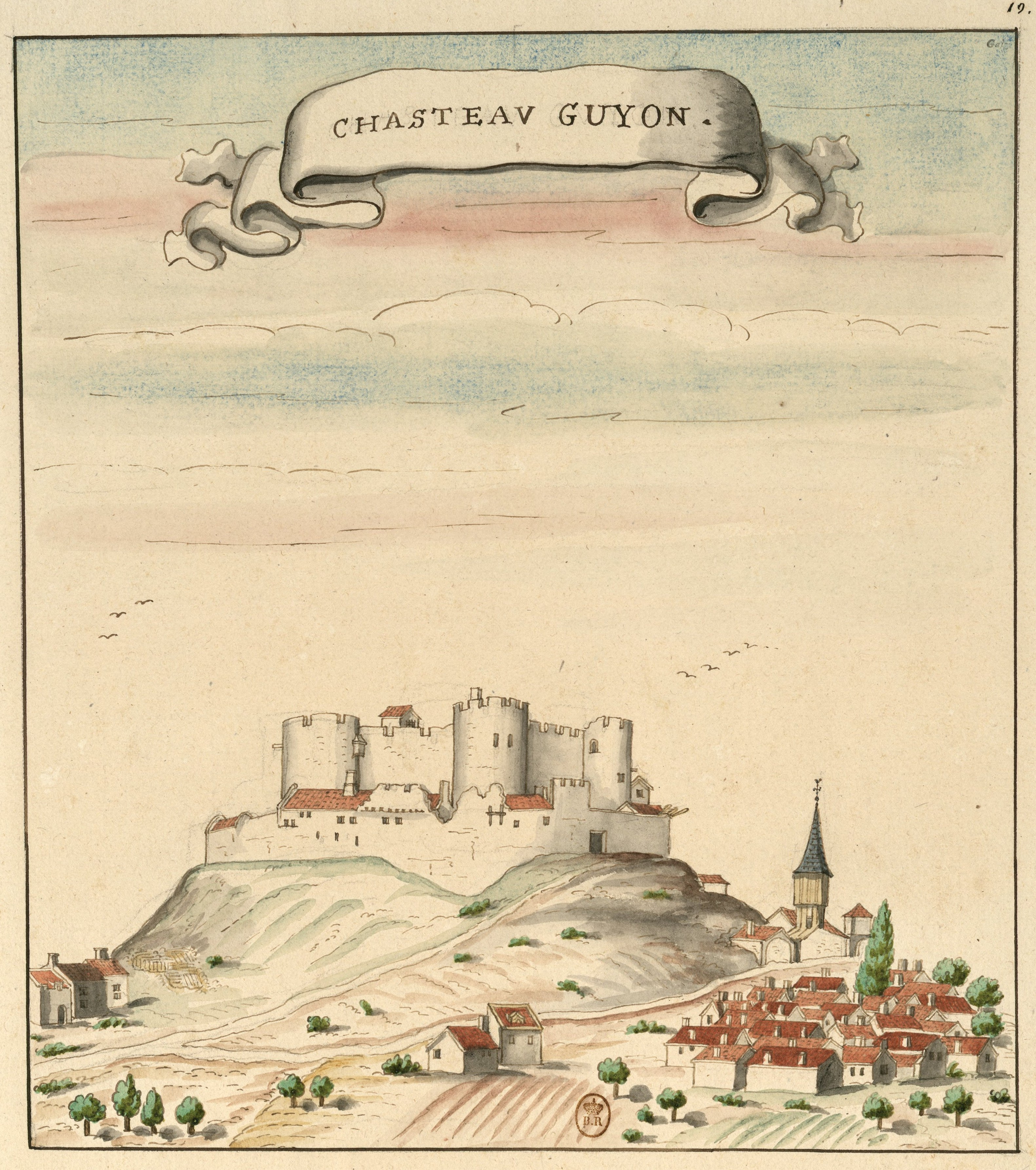 Dessin du château et du village de Châtel-Guyon (vers 1450) inspiré de Guillaume Revel, L'armorial d'Auvergne, Bourbonois et Forestz.